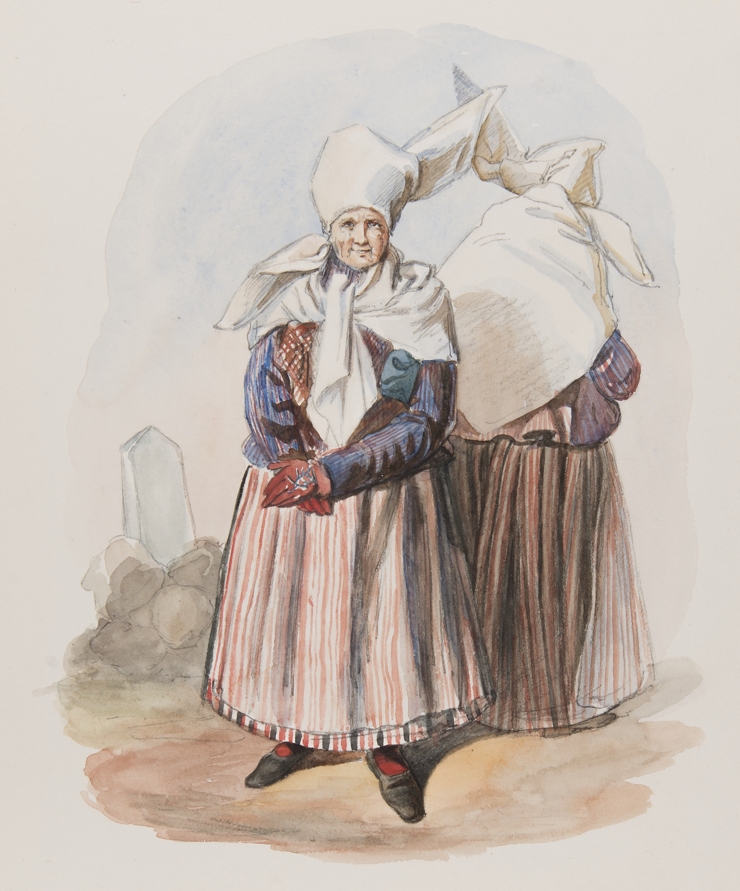 Dräkt. Kvinna fram och bak. Östergötland, Finspång, Skedevi. Akvarell i storformat av J.W Wallander Depicted place: Q10495607 (Q10495607) (Härad), Skedevi socken (Q10669922)